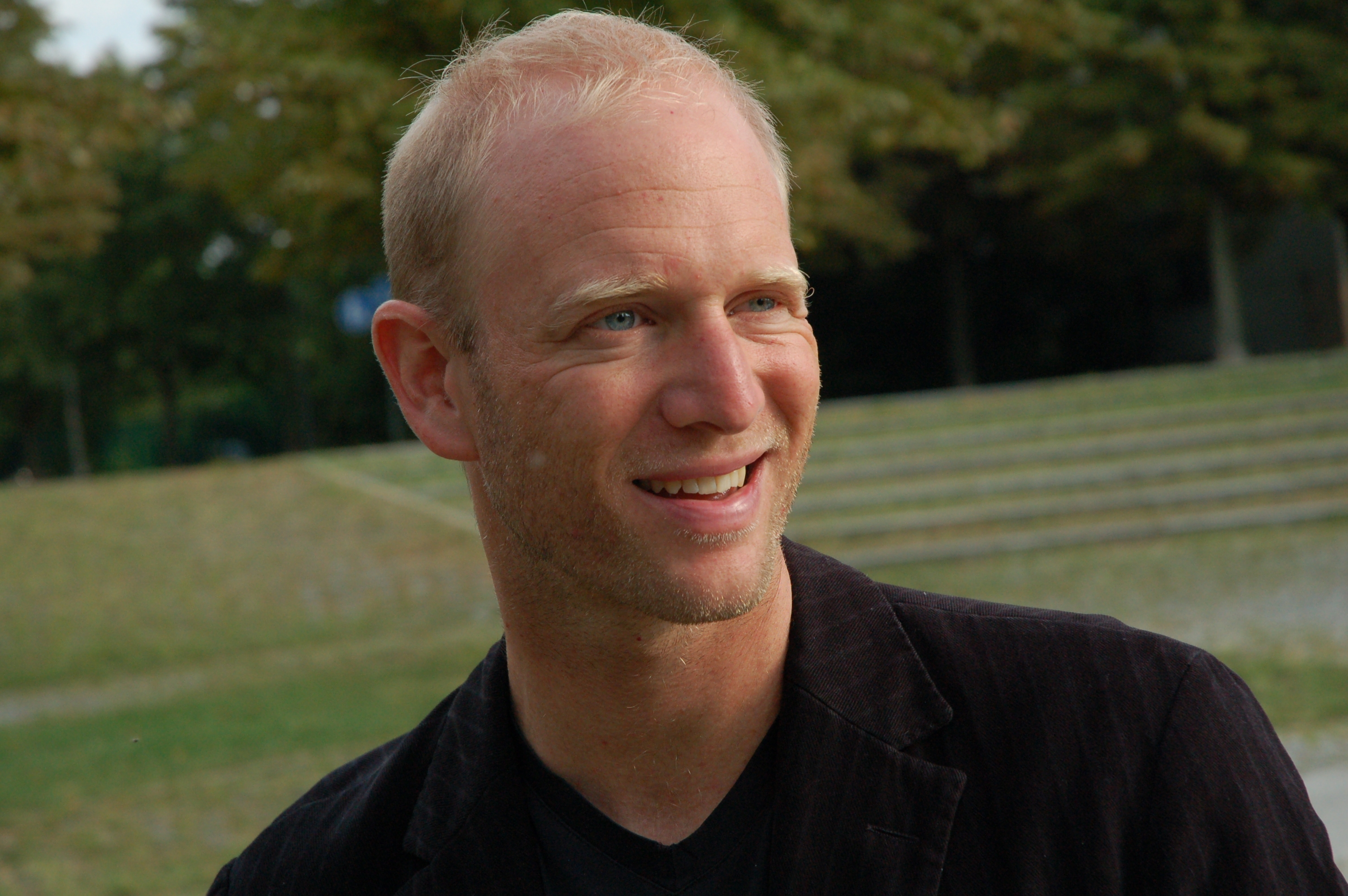 Portrait des Schriftstellers und Reisebuchautors Thomas Bauer